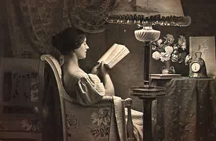 Contant Puyo: La veillée